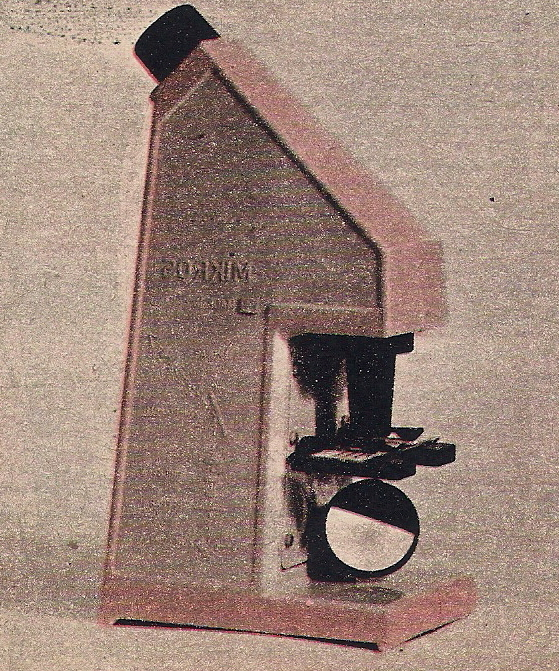 Mikroskop szkolny Mikros. Produkowany przez Polskie Zakłady Optyczne, Warszawa w latach 70. XX wieku.